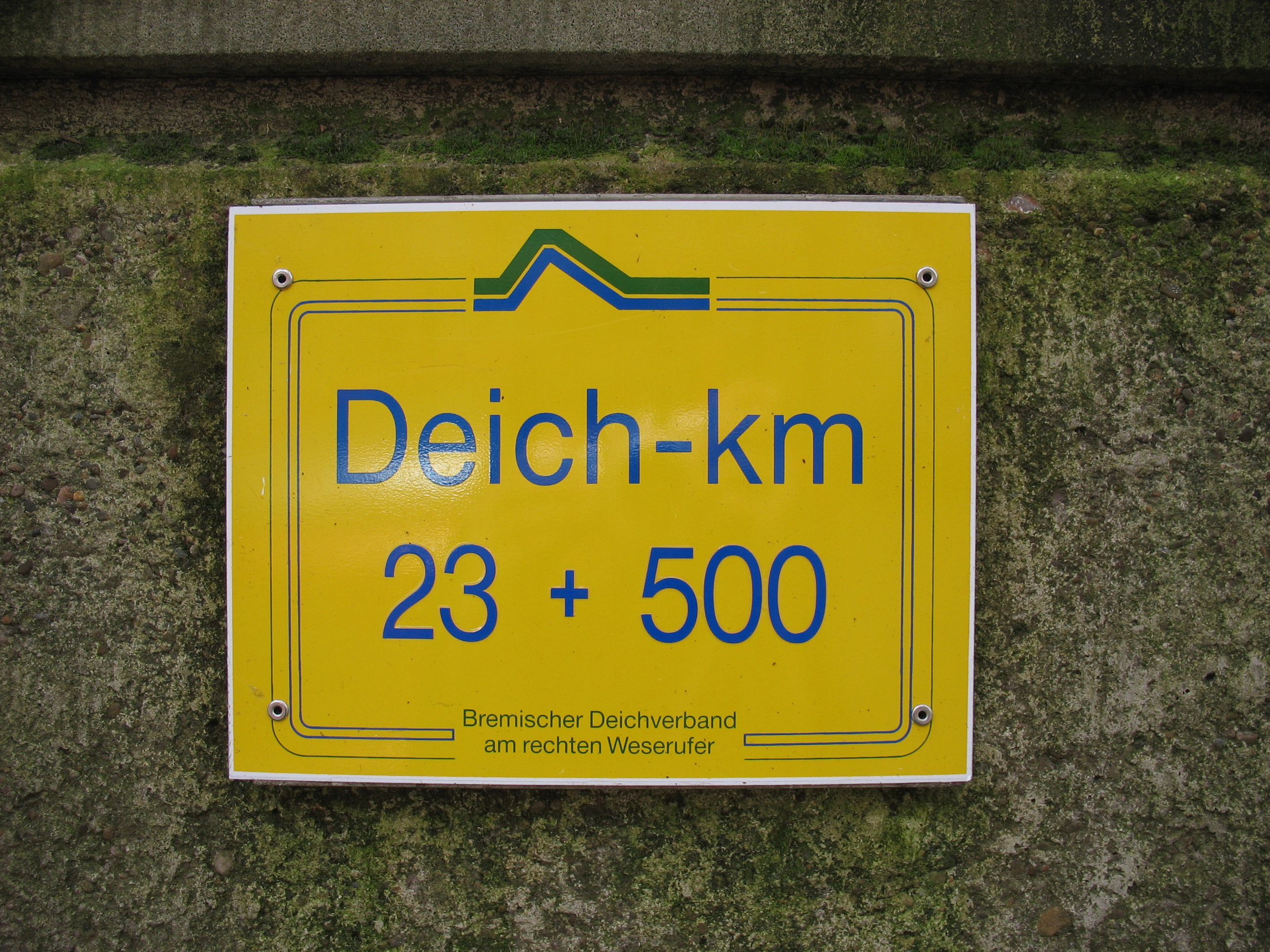 Hinweisschild: Deich-km 23,5 // Bremischer Deichverband am rechten Weserufer